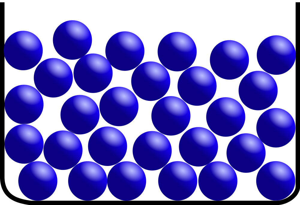 liquid model